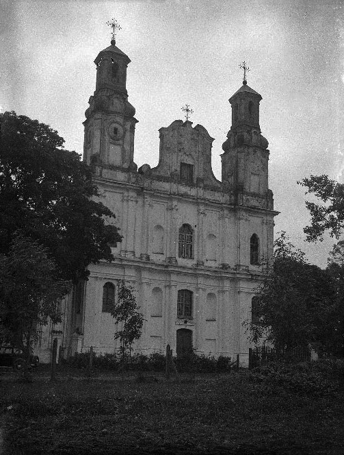 Беларуская (тарашкевіца): Таракань. Манастыр базылянскі Яўленьня Гасподняга